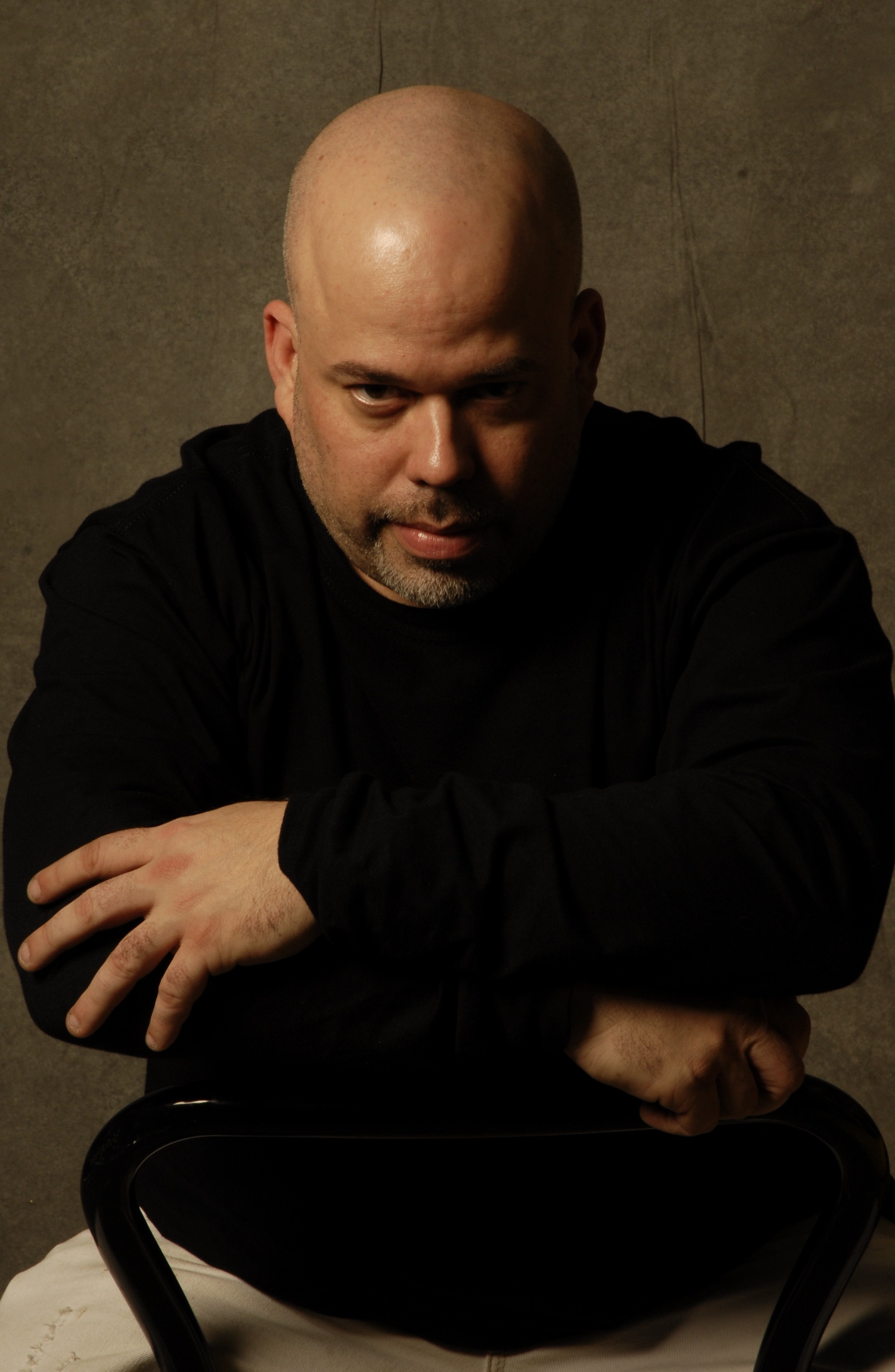 Iván Joy en el estudio Diamond Music. San Juan, Puerto Rico, noviembre 2011